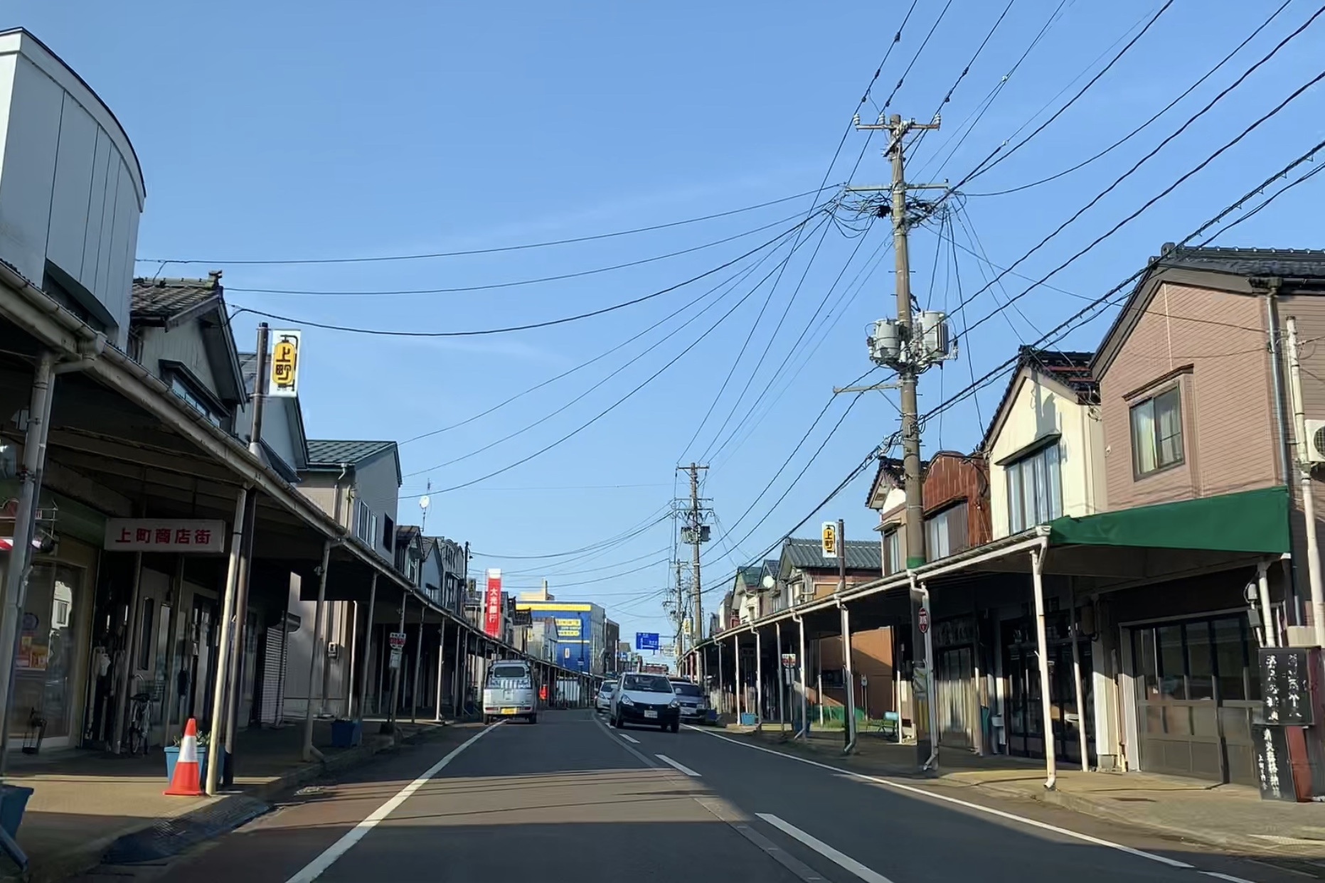 与板市街地（新潟県長岡市，2020年3月）国道403号